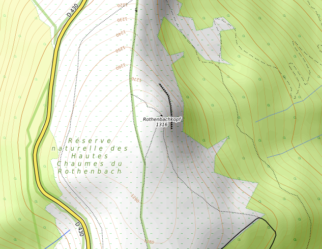 carte réalisée sur umap This map may be incomplete, and may contain errors. Don't rely solely on it for navigation.